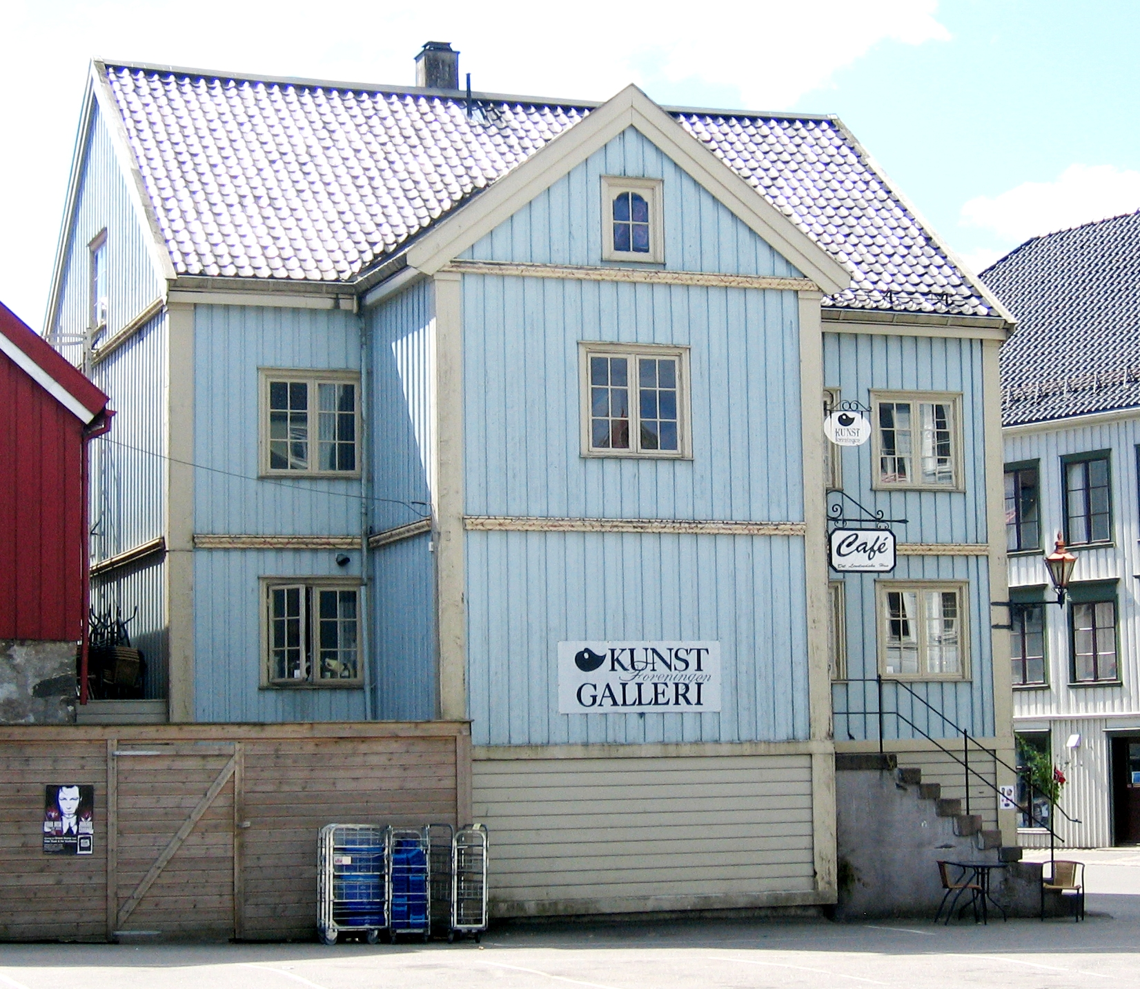 Lindvedske hus at Tyholmen in Arendal. Bygningen går inn i kulturmiljø Tyholmen.